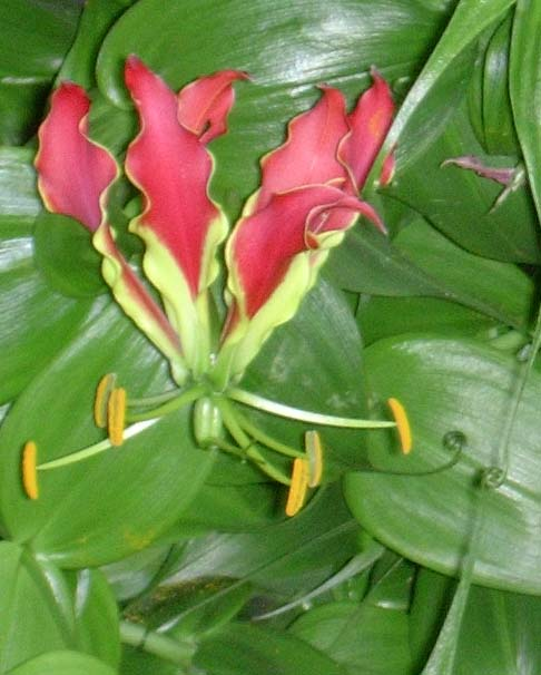 Ruhmeskrone